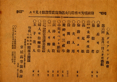 京城高等演藝館 (경성고등연예관) の宣伝チラシ、1910年